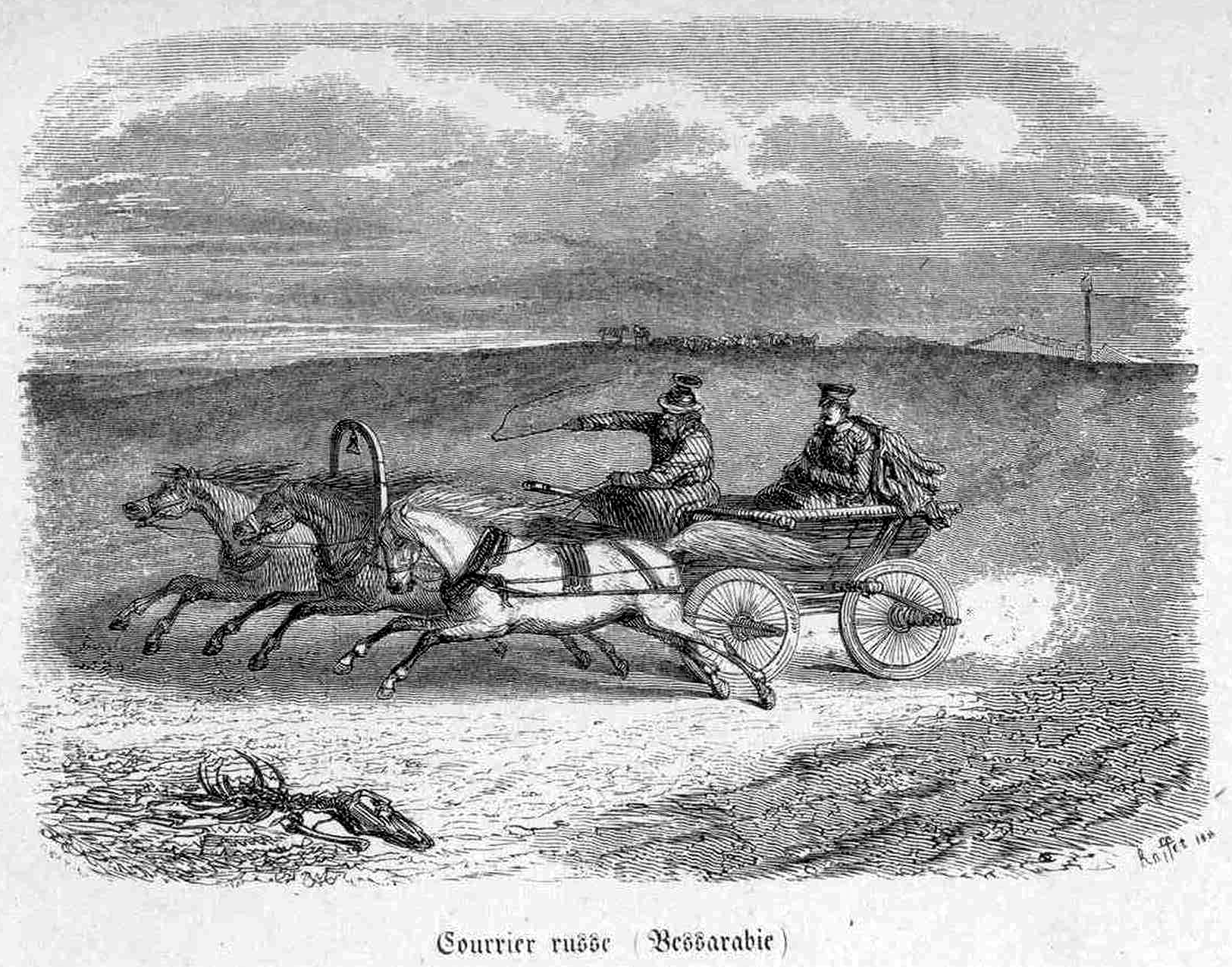 Courrier russe Bessarabie